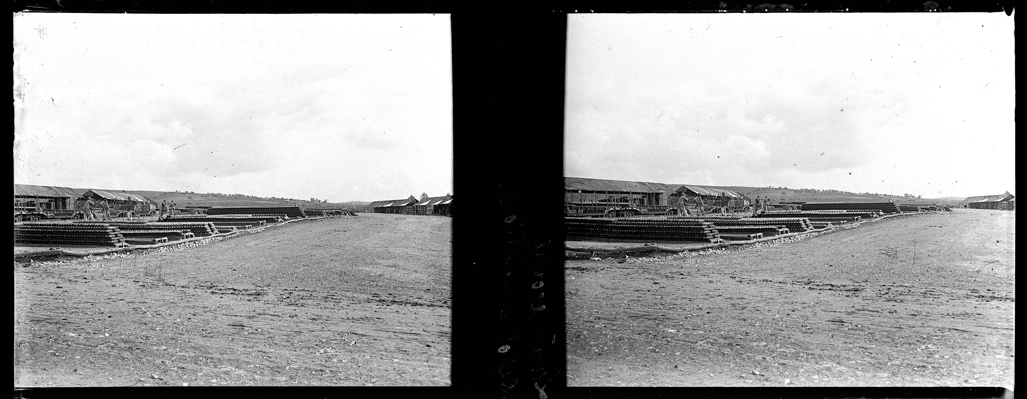 Vue d'ensemble d'un dépôt de munitions à Landrecourt (Meuse). 1916. Guerre 1914-1918.